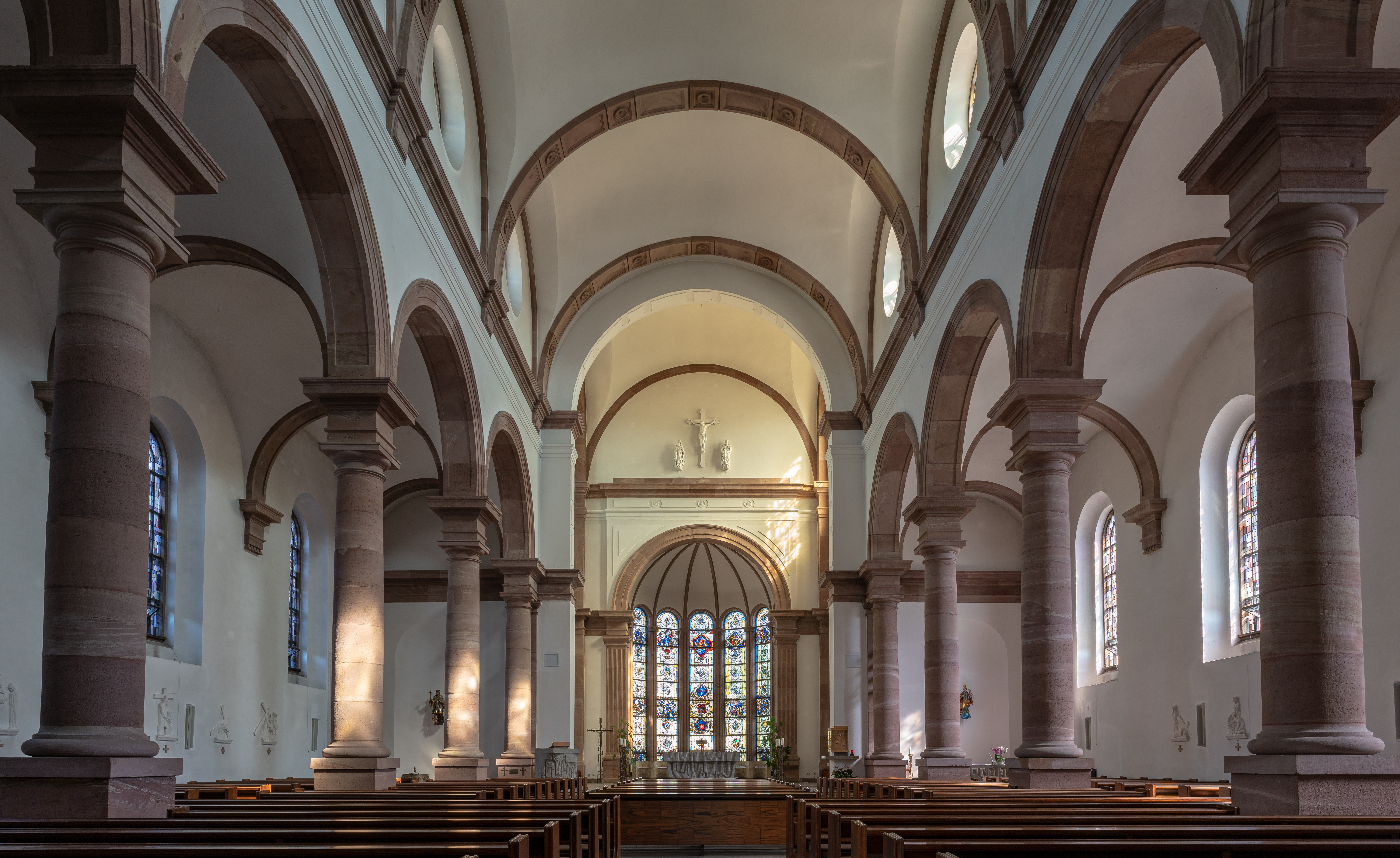 Eberbach (Rhein-Neckar-Kreis): Innenansicht der Kirche St. Johannes Nepomuk, 1884–1887 im Neorenaissance-Stil erbaut. Blick entlang des Hauptschiffes zum Chor. Die Fenster im Chor wurden erst 1970 geschaffen. Ich gehe davon aus, dass sie für dieses Foto als Beiwerk im Sinne des Urheberrechtes gelten und daher im Bild bleiben dürfen – es ist nicht möglich, die Kirche mit Blick zum Chor zu fotografieren, ohne dass diese Fenster in den Blick kommen. Dasselbe gilt m.M.n. für Altar, Ambo und andere moderne Details der Ausstattung. Sollte es daran Zweifel geben, werde ich eine Version dieses Bildes hochladen, in der Fenster, Altar usw. geschwärzt sind.